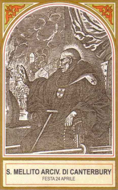 San Mellito di Canterbury Arcivescovo (+624).